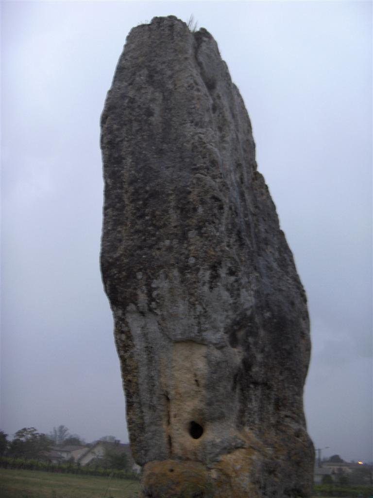 Menhir de Pierrefitte in Saint-Sulpice-de-Faleyrens (Gironde - FRANCE)